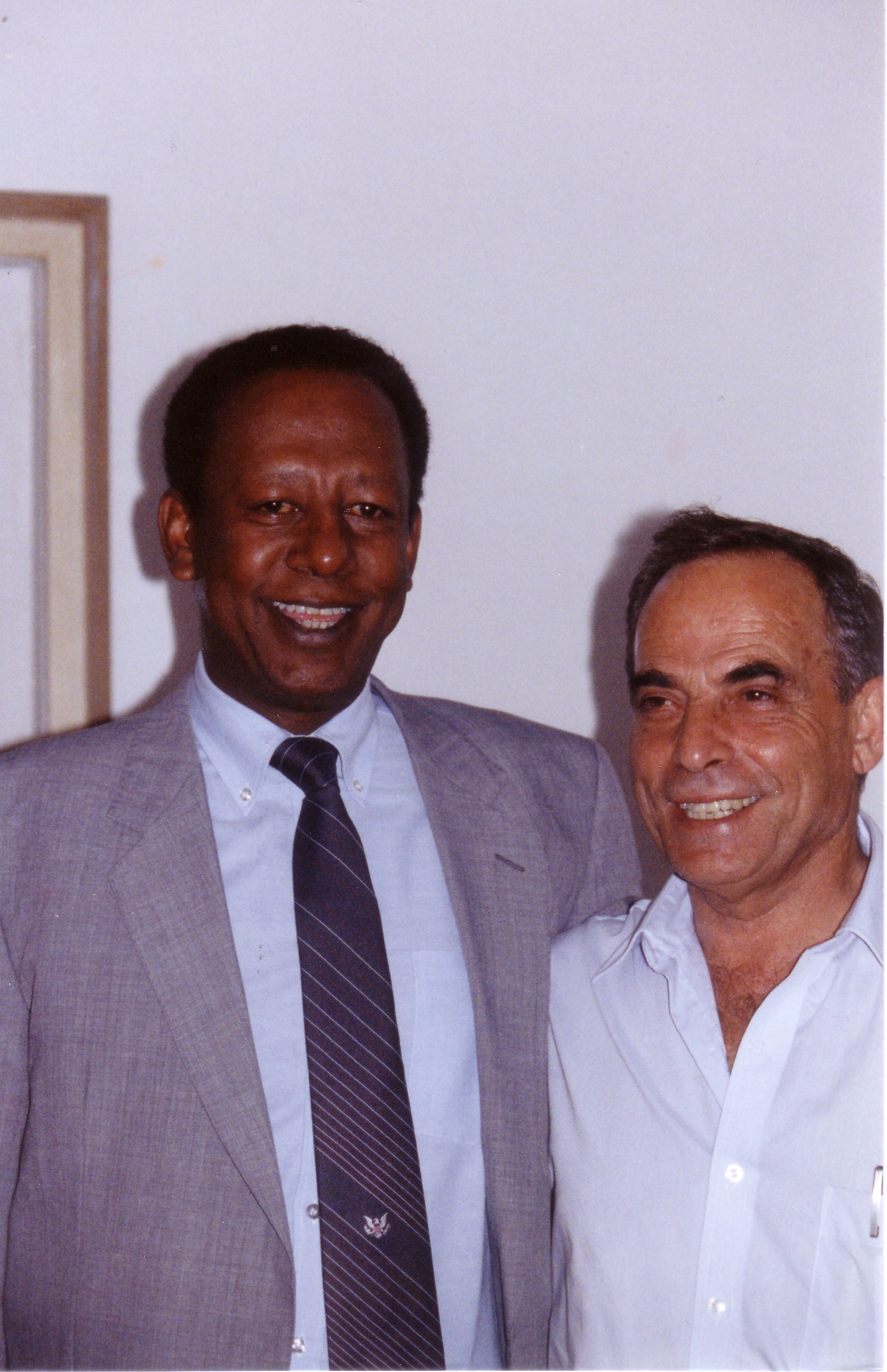 אלי אליעזרי וקסה קבדה